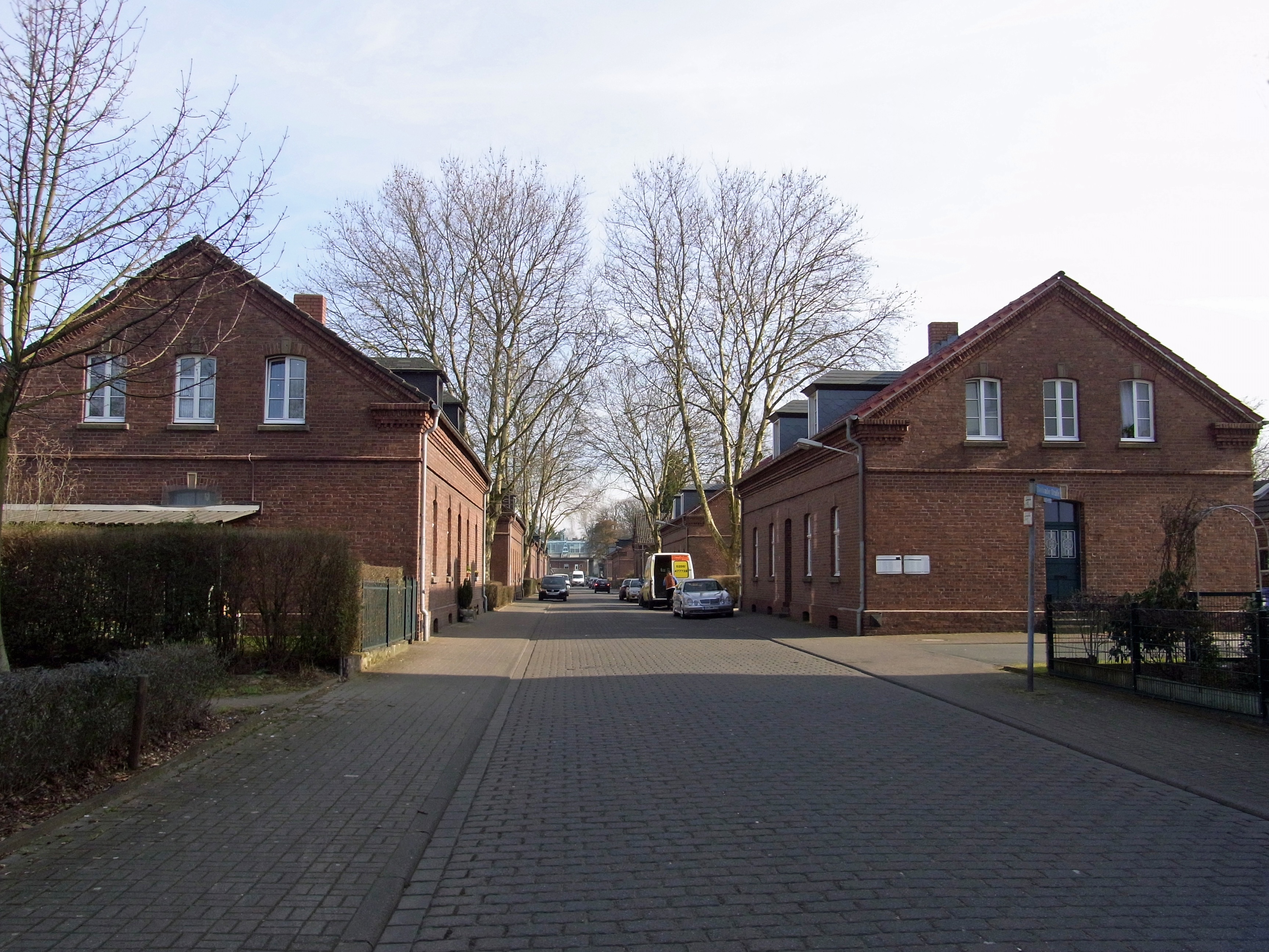 Siedlung Eisenheim Eisenheimer Straße 1910